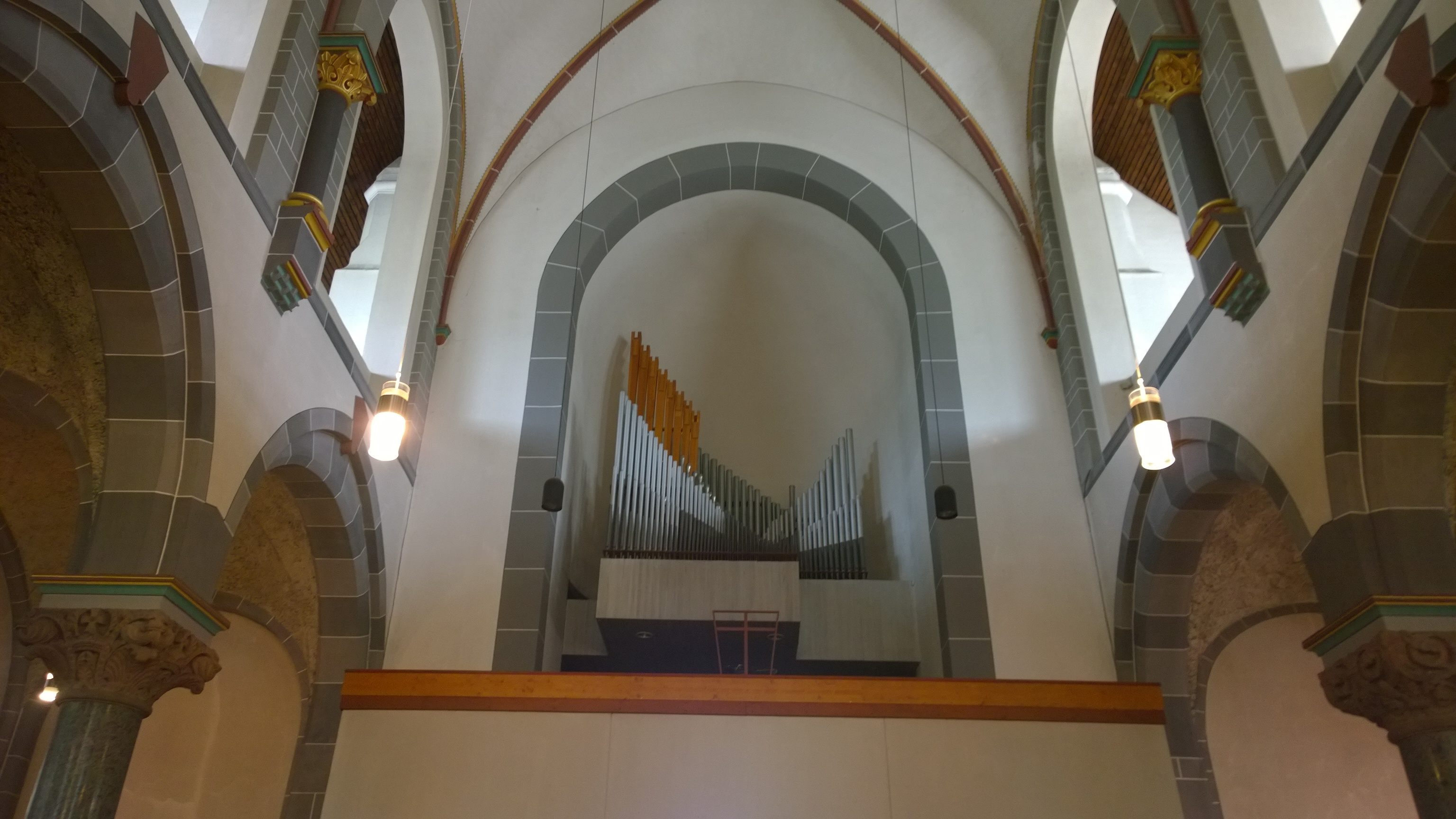 Orgel-St. Suitbertus Solingen